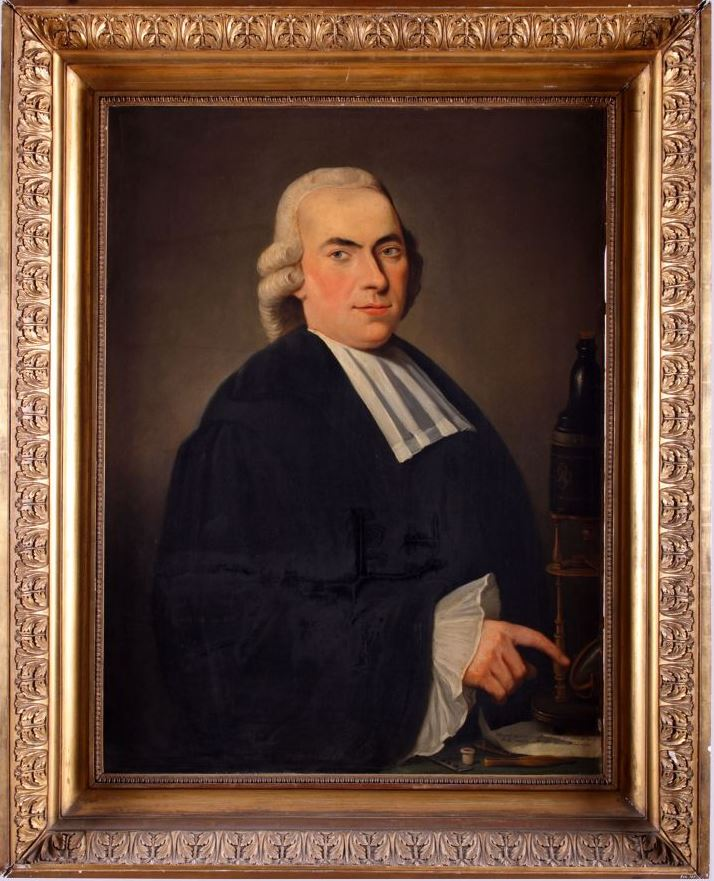 Portret in olieverf van Antonius Brugmans, professor in de filosofie en natuurkunde aan de Franeker universiteit van 1755 tot 1766. De microscoop is van het type Culpeper.